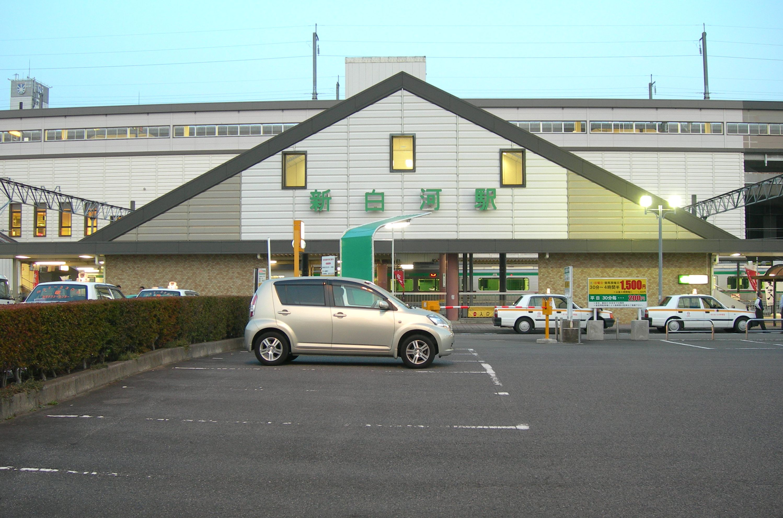 JR東日本 新白河駅西口